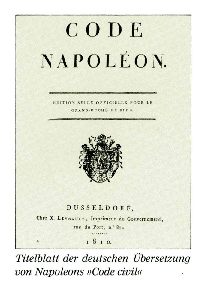 Titelblatt der deutschen Ausgabe des Code Civil des Français, Düsseldorf 1810. (Original Edition 1804)